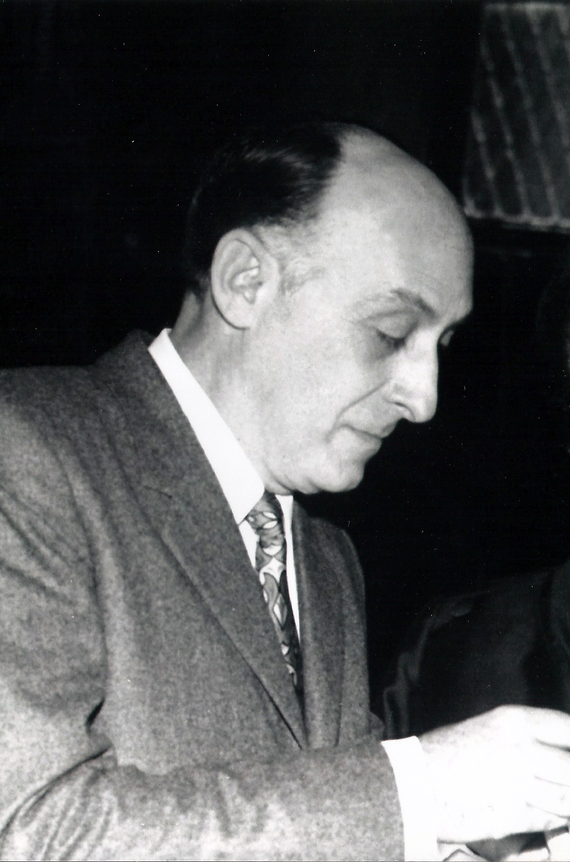 Nino Porto 1970